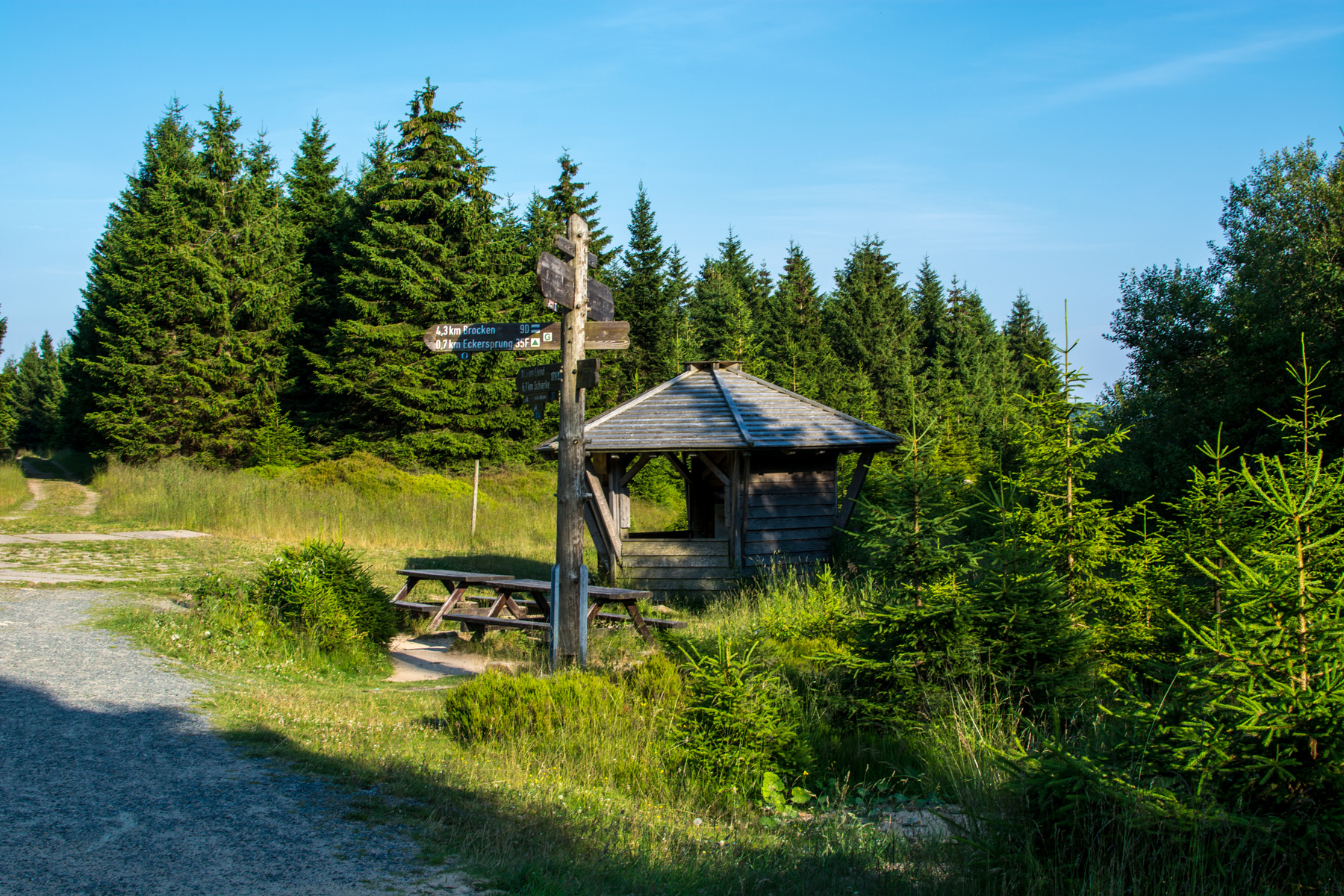 Schutzhütte am Dreieckigem Pfahl HWN 168